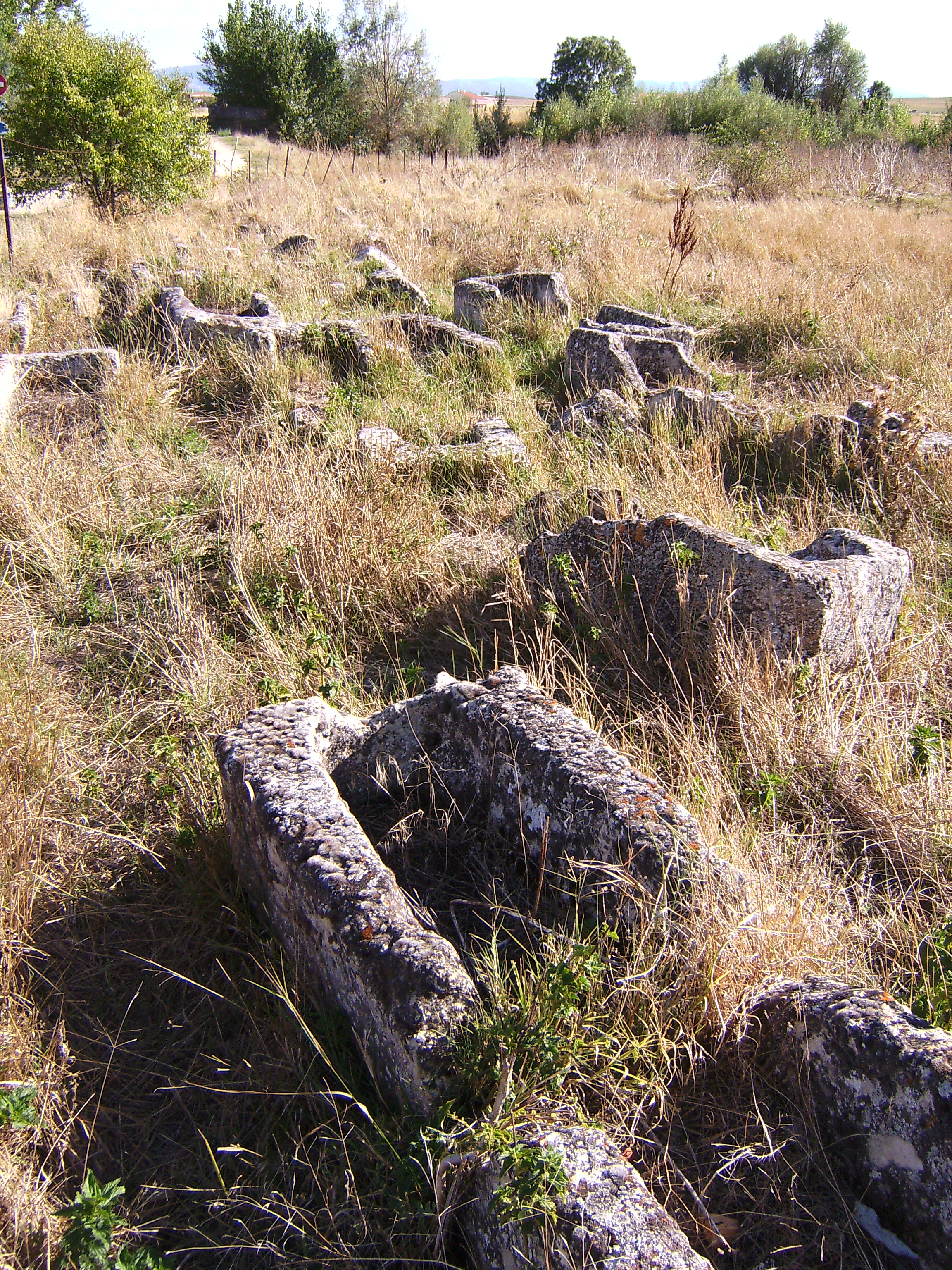 Sarcofagos